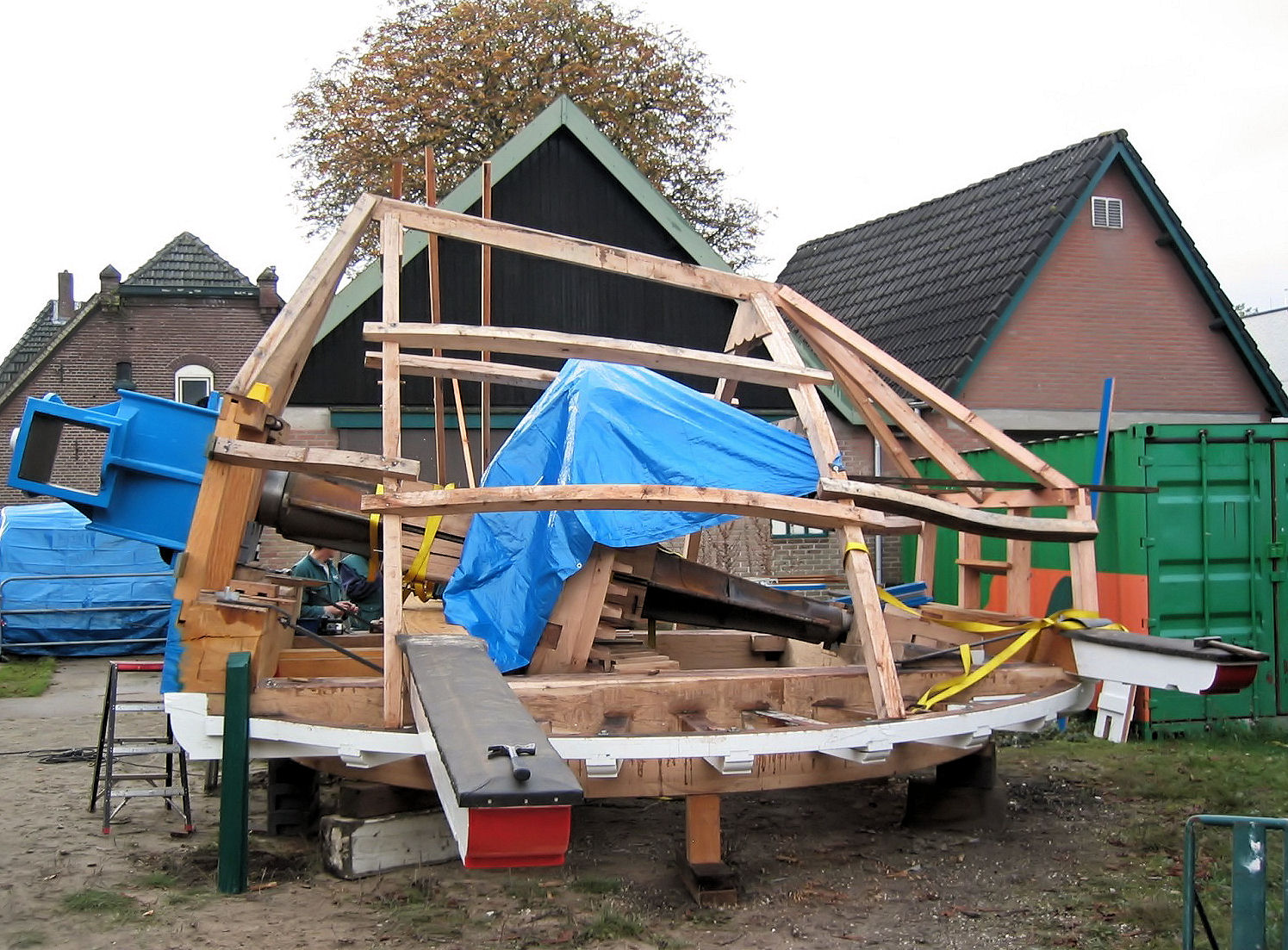 Molen De Koe Ermelo kapconstructie